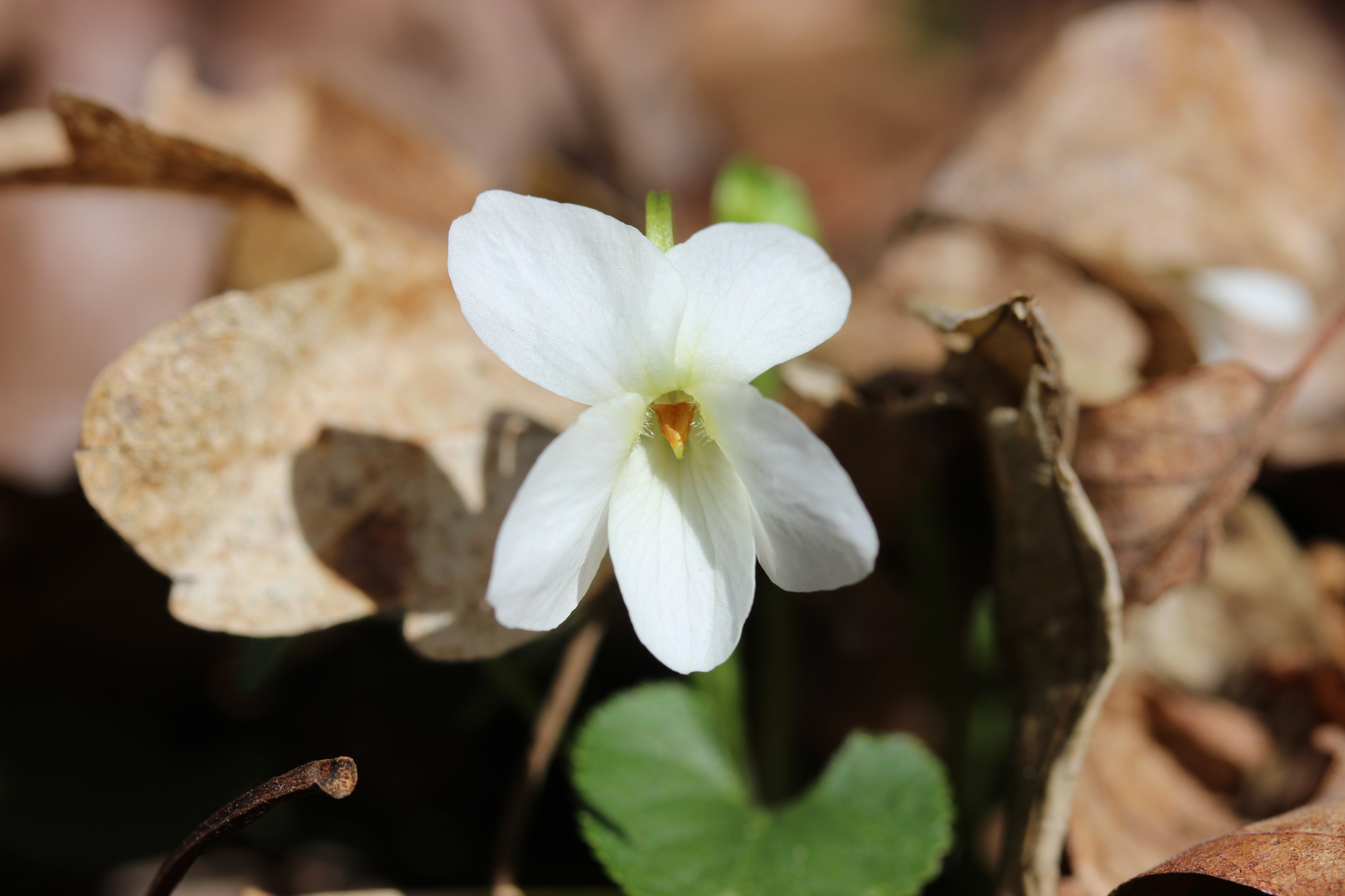 White Violet - Viola alba